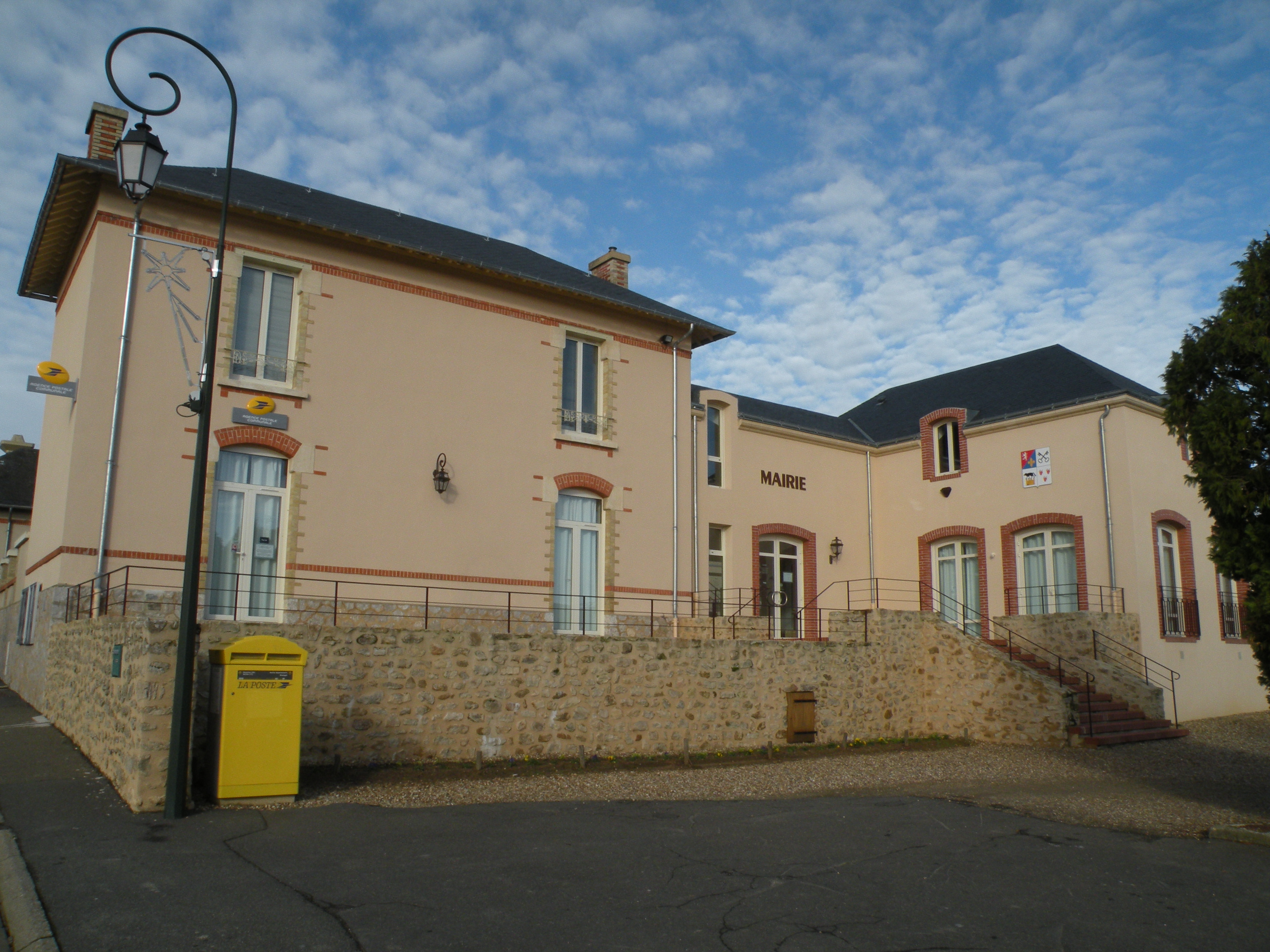 Mairie de Sillé-le-Philippe.